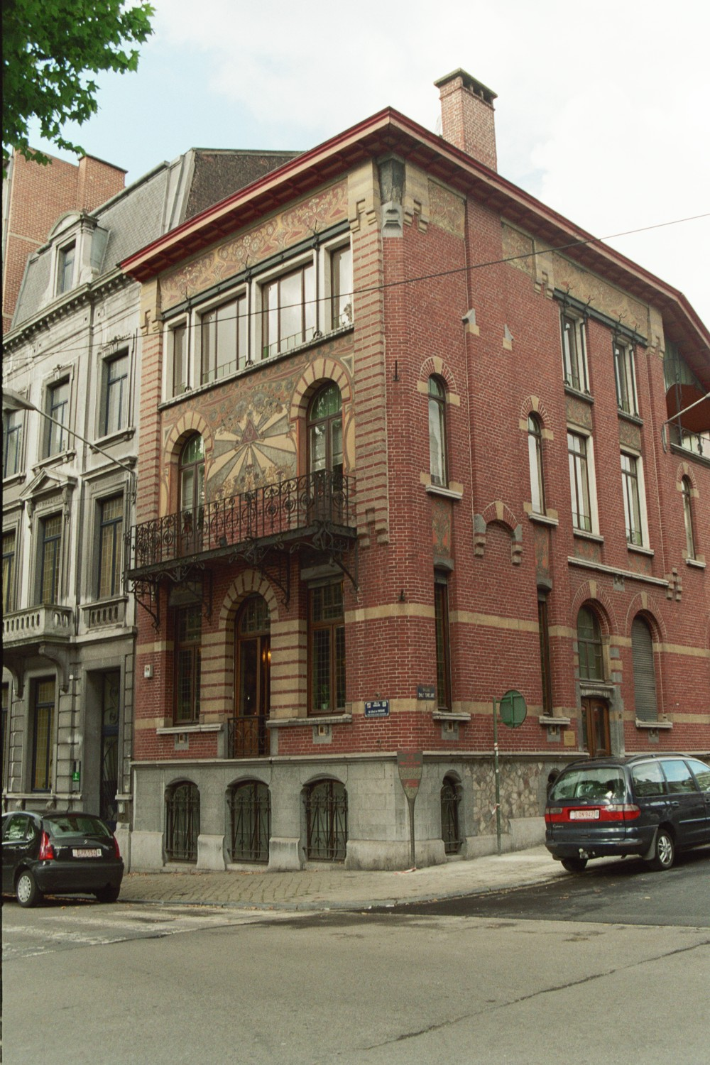 Charleroi - Maison dorée - vue générale